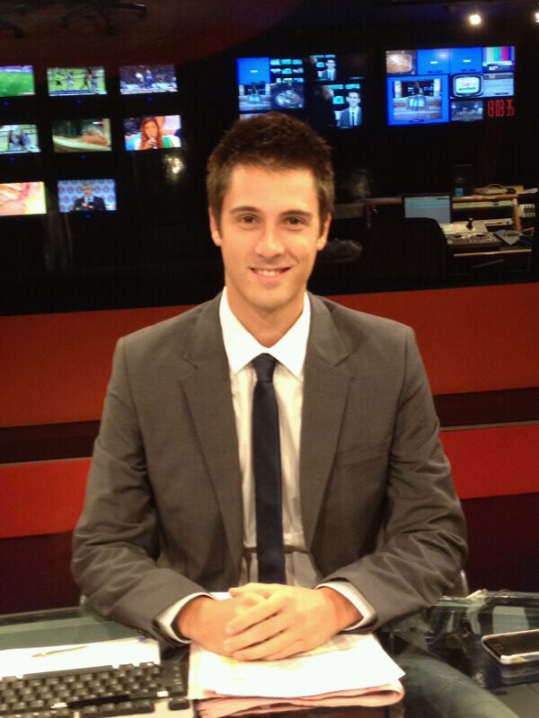 Foto Matteo Ronchetti